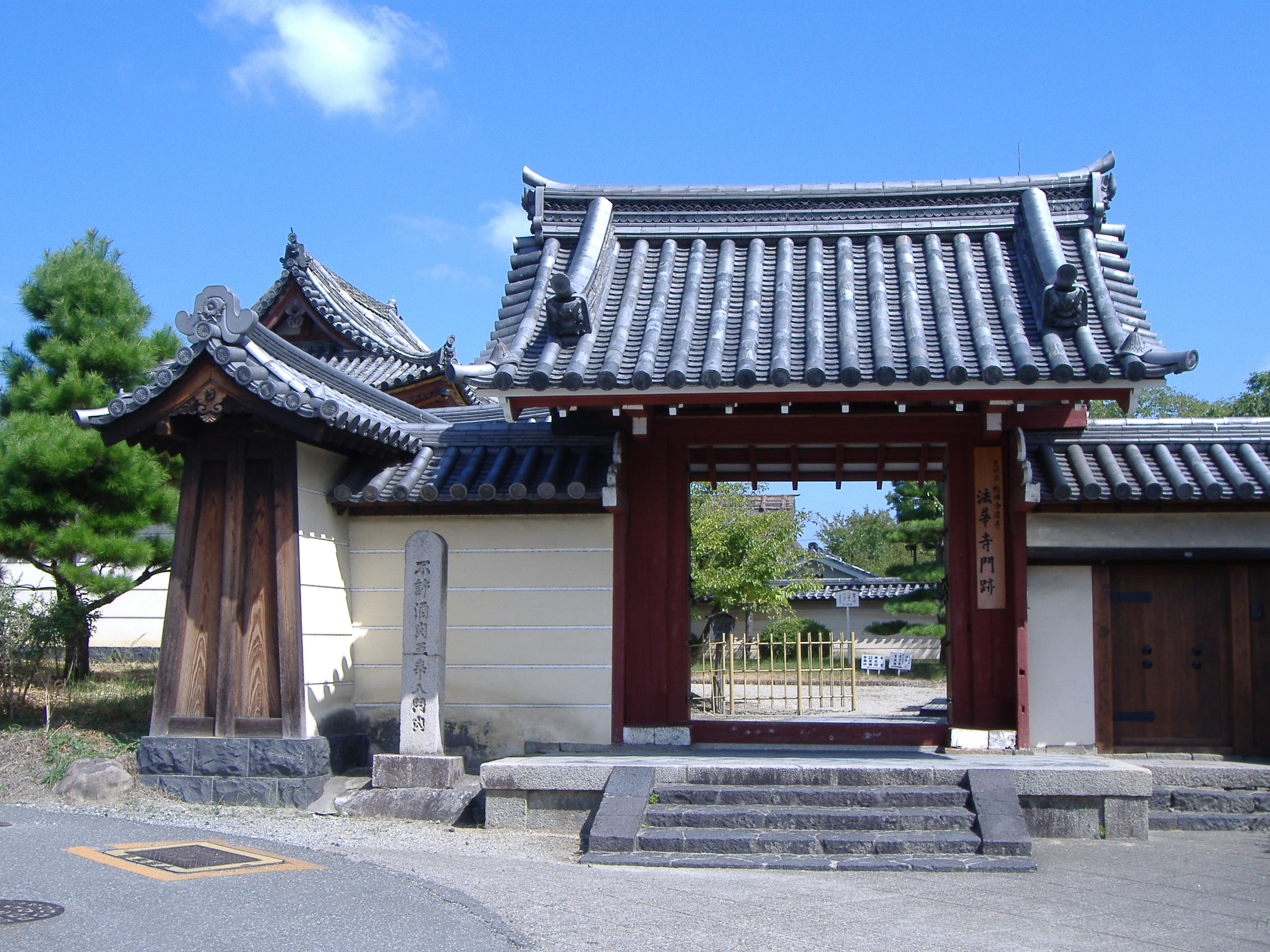 法華寺（奈良市） 赤門